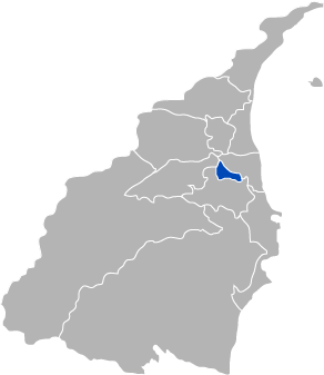 KaurJmeb為編輯中華民國臺灣省宜蘭縣羅東鎮，於2005年2月8日所繪。